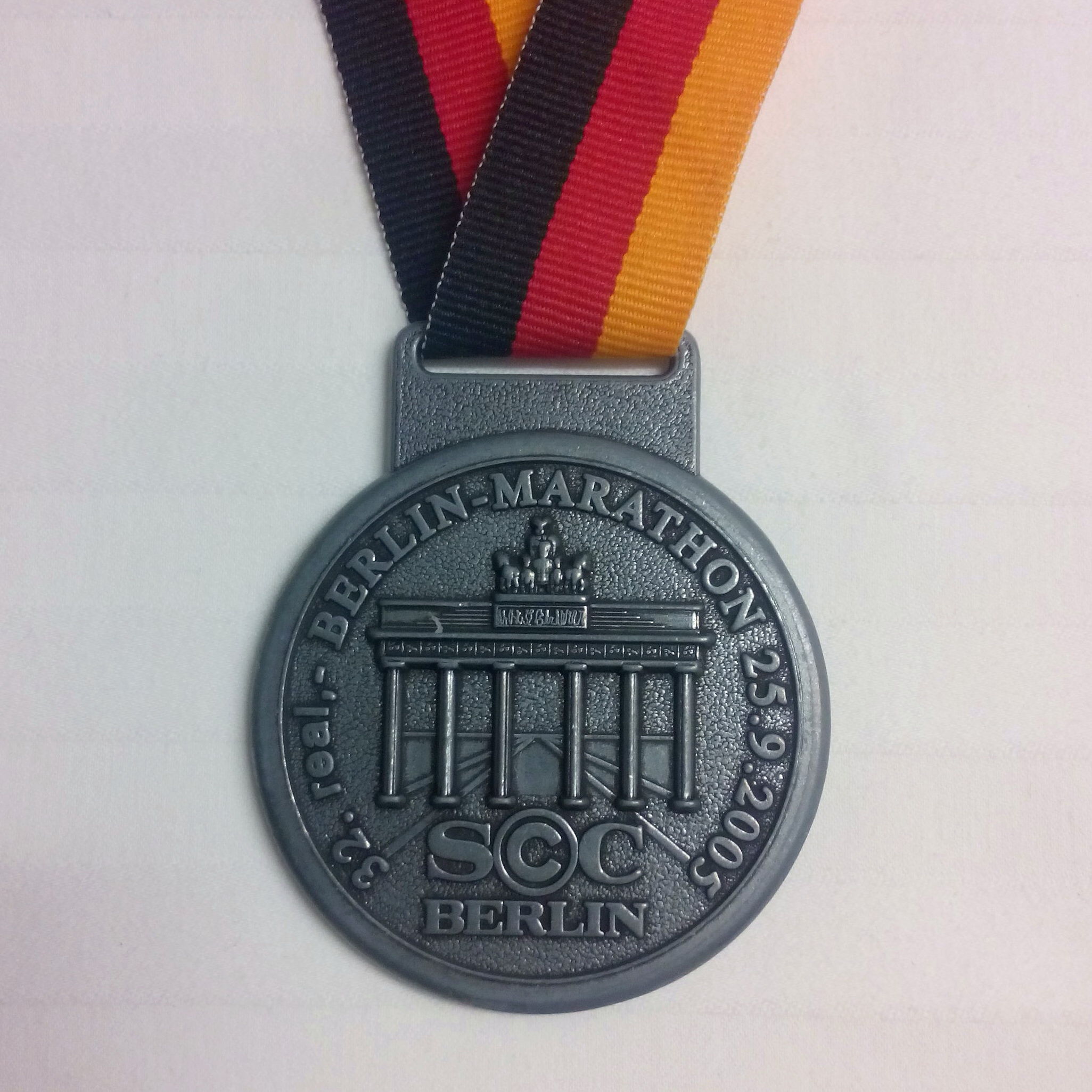 Finisher-Medaille des 32. Berlin Marathon 2005.